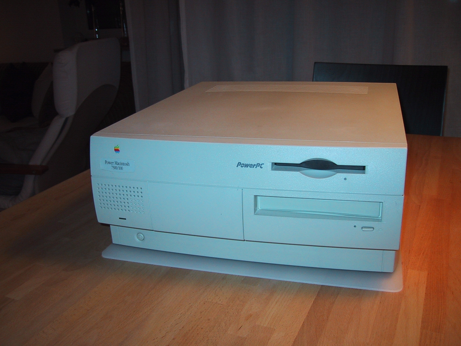 Apple Power PC 7500 100 MHz